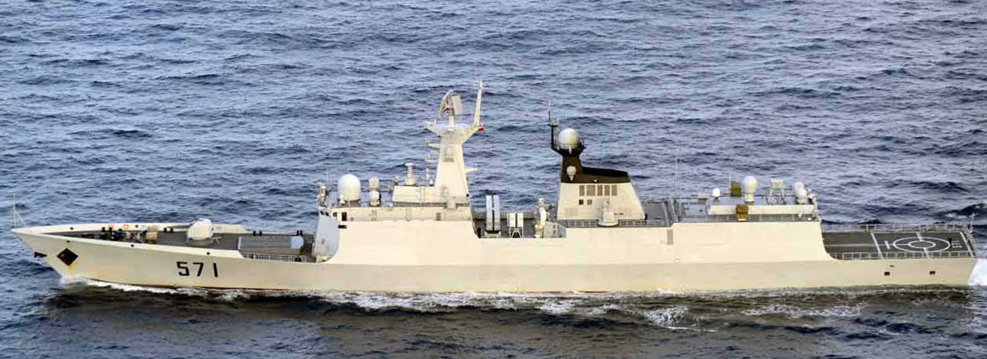 １０月２２日（月）午後５時頃、海上自衛隊第５航空群所属「Ｐ－３Ｃ」（那覇）が、沖縄本島の南約４７０ｋｍの海域を北進する中国海軍ルーヤンⅠ級ミサイル駆逐艦１隻、ルーヤンⅡ級ミサイル駆逐艦１隻及びジャンカイⅡ級フリゲート１隻の合計３隻を確認した。このうち、ルーヤンⅡ級ミサイル駆逐艦は、海上自衛隊において初めて確認したものである。